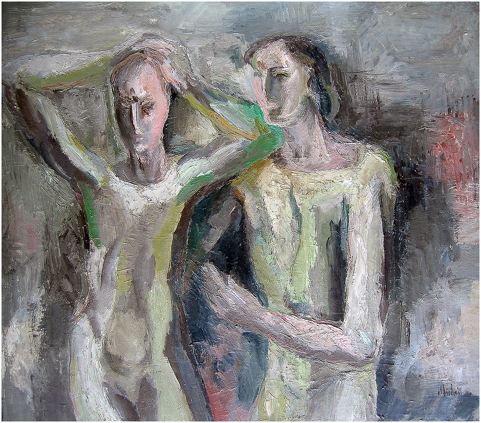 Rastislav Michal, Nevěsta z páté čtvrti, olej na plátně, 1978 Unknown rastislav michal, bride from the fifth district, oil painting on canvas, 1978